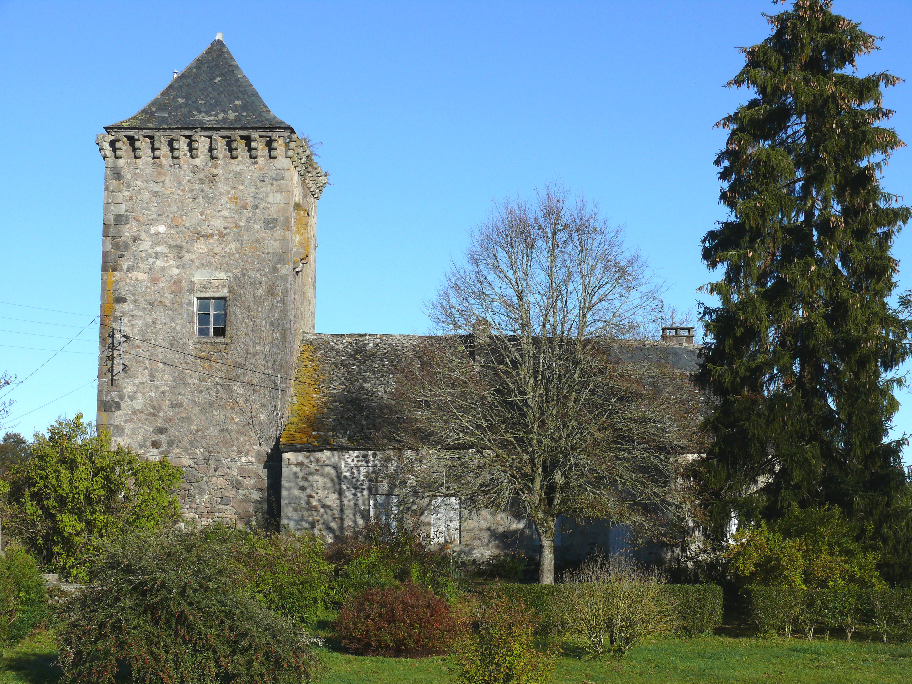 Sauvat - Tour de Chavagnac